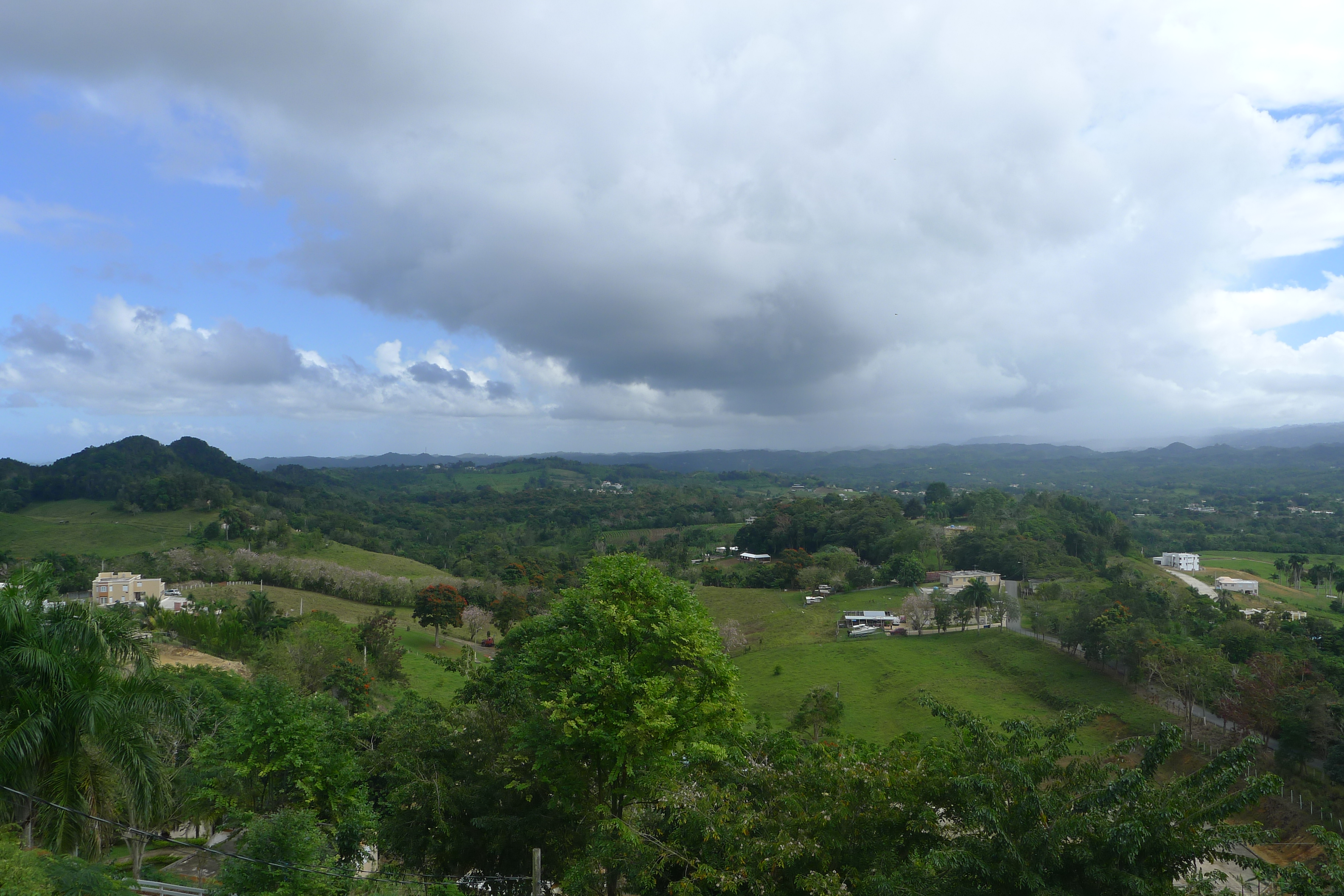 Pugnado Adentro, Vega Baja, Puerto Rico